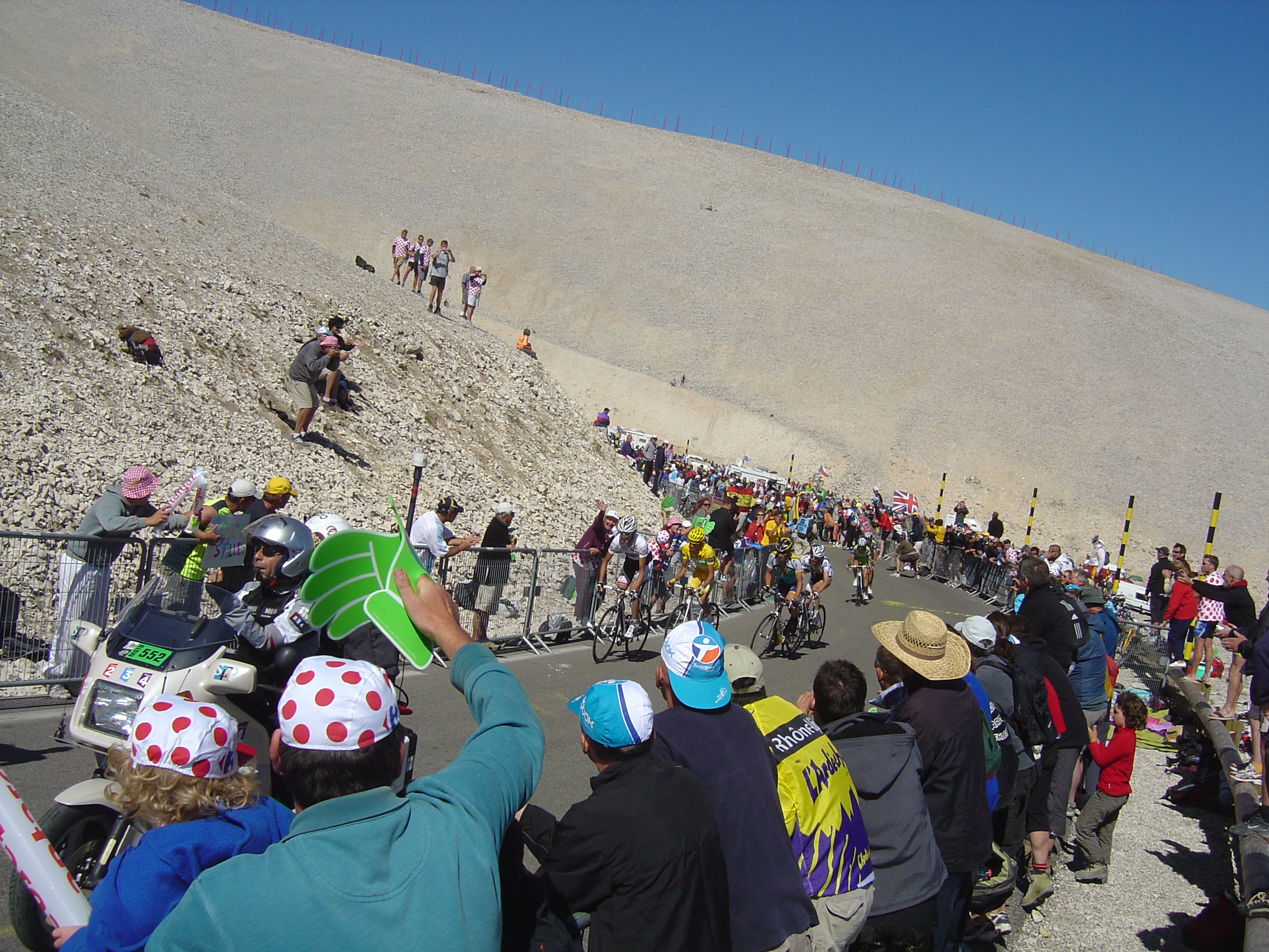 Le groupe maillot jaune lors de la 20e étape du Tour de France 2009 au Mont Ventoux